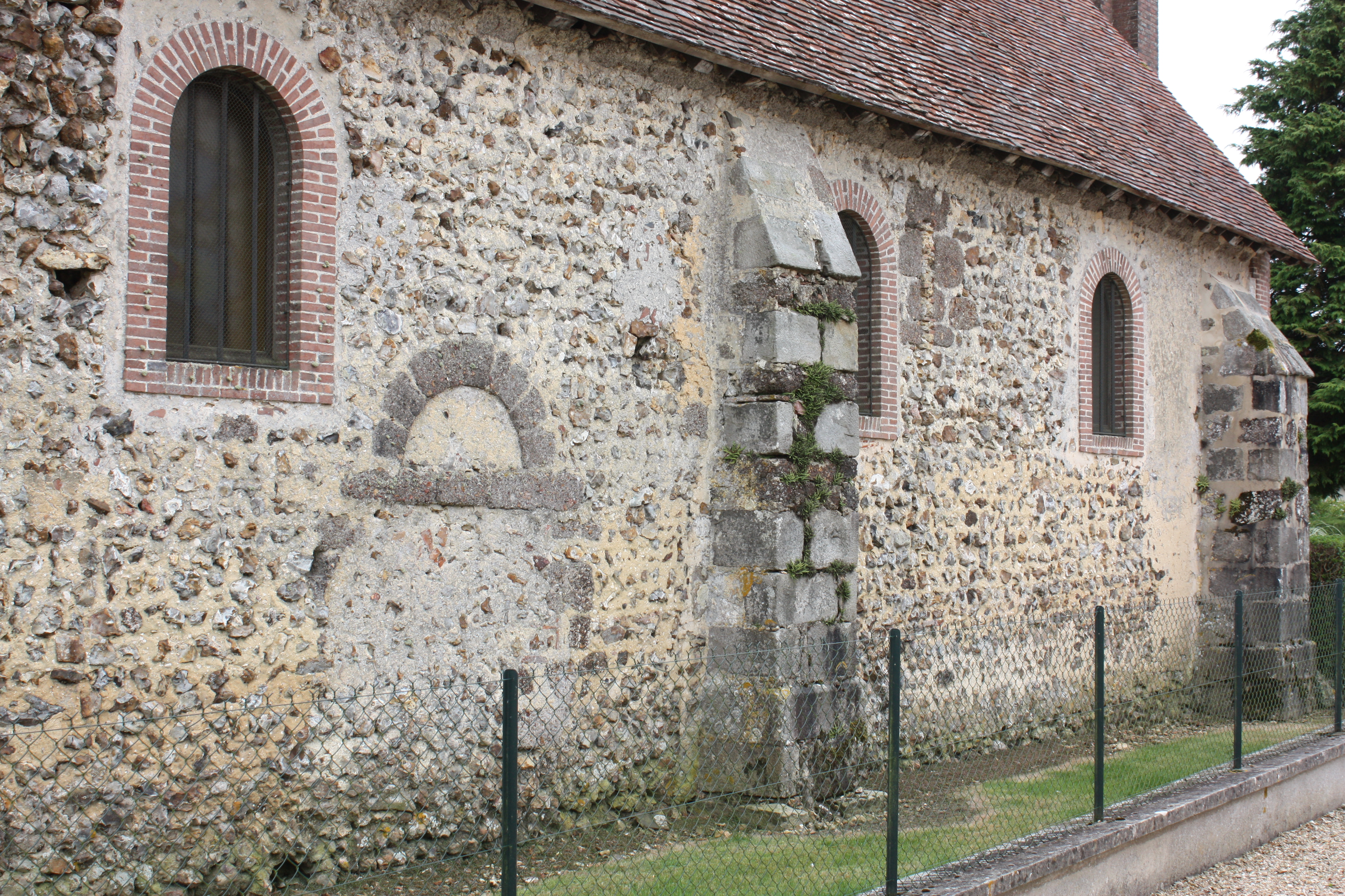 La Chapelle-Fortin - Eglise Saint-Pierre Mur Nord de la nef